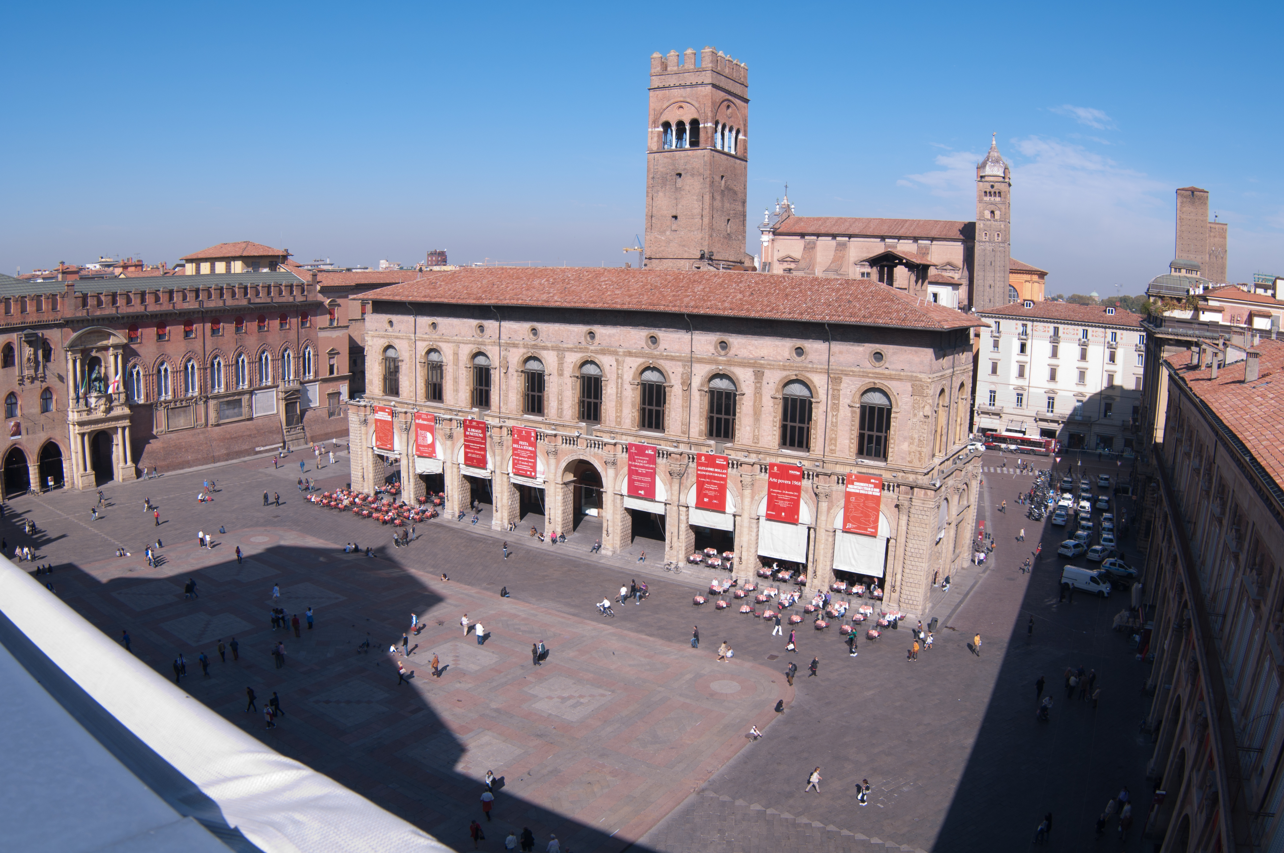 Piazza Maggiore - MIBAC This is a photo of a monument which is part of cultural heritage of Italy.